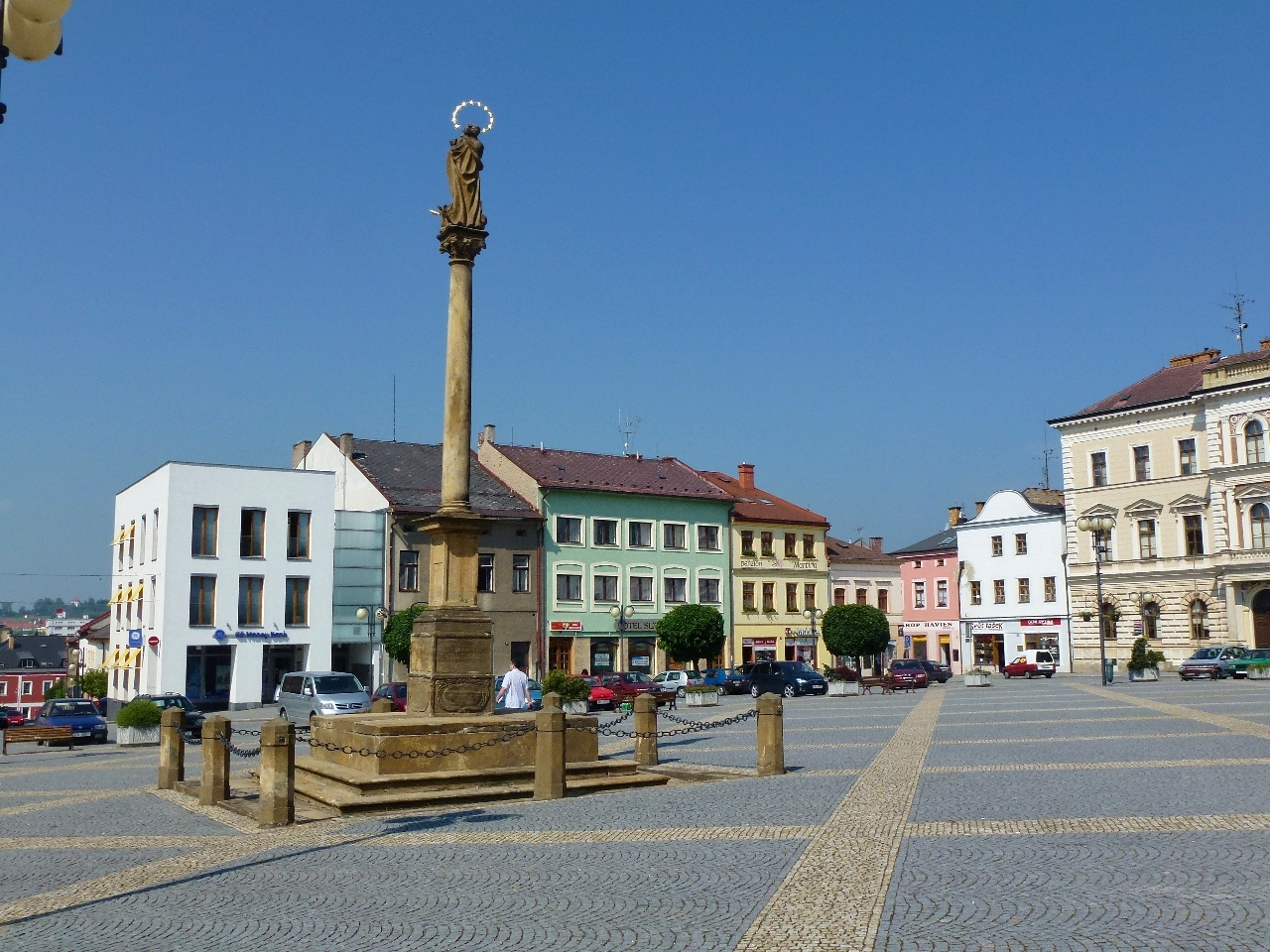 Sloup se sochou Panny Marie Immaculaty (Lanškroun), nám. J. M. Marků, Lanškroun